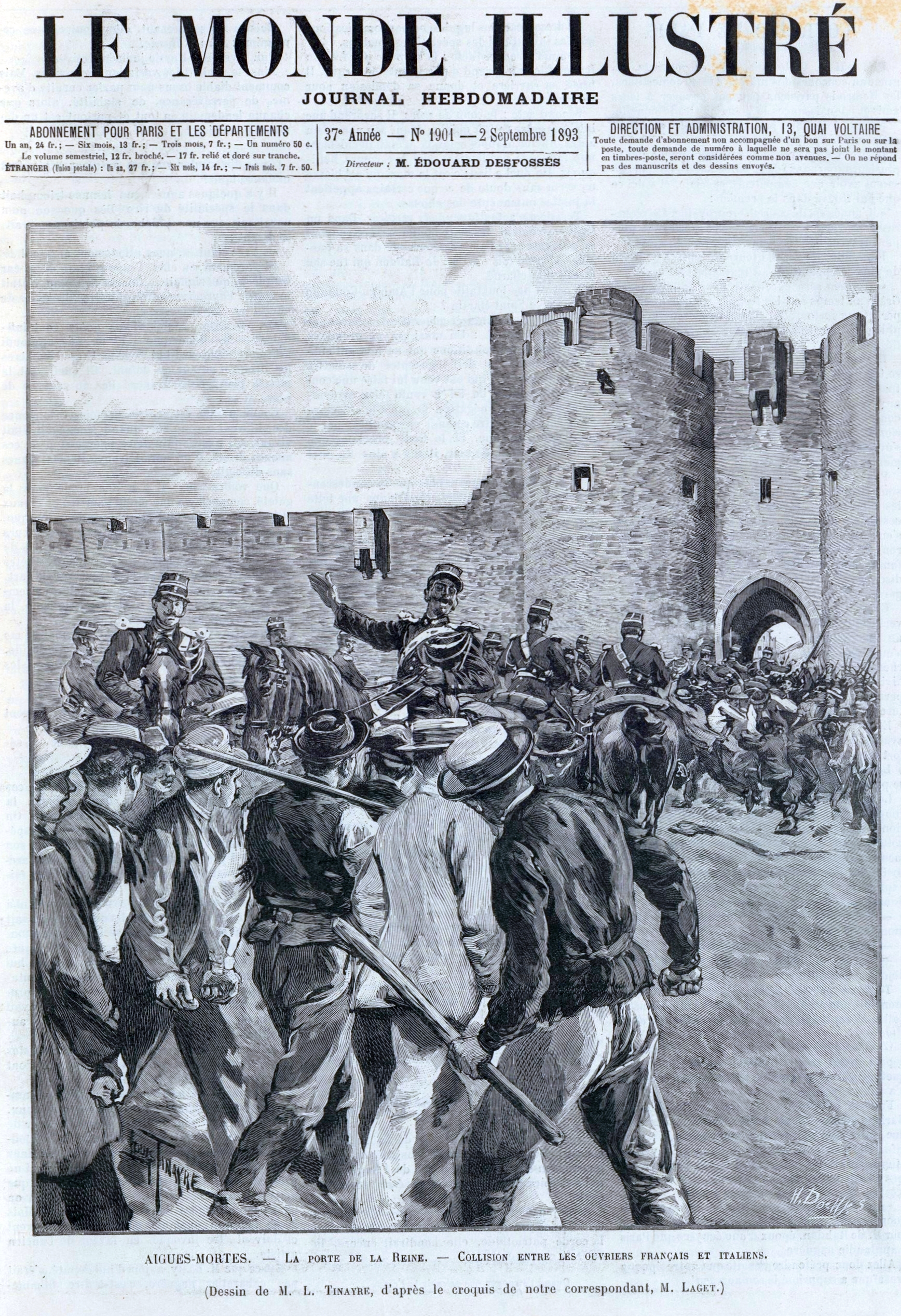 Arrivée de la troupe à Aigues-Mortes, Gravure publiée dans Le Monde illustré / "Aigues-Mortes. La porte de la reine : collision entre les ouvriers français et italiens". Dessin de M. L. TINAYRE, d'après le croquis de notre correspondant, M. LAGET.